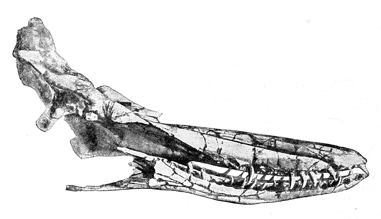 Idiorophus patagonicus